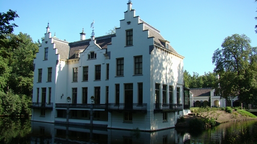 Kasteel Staverden